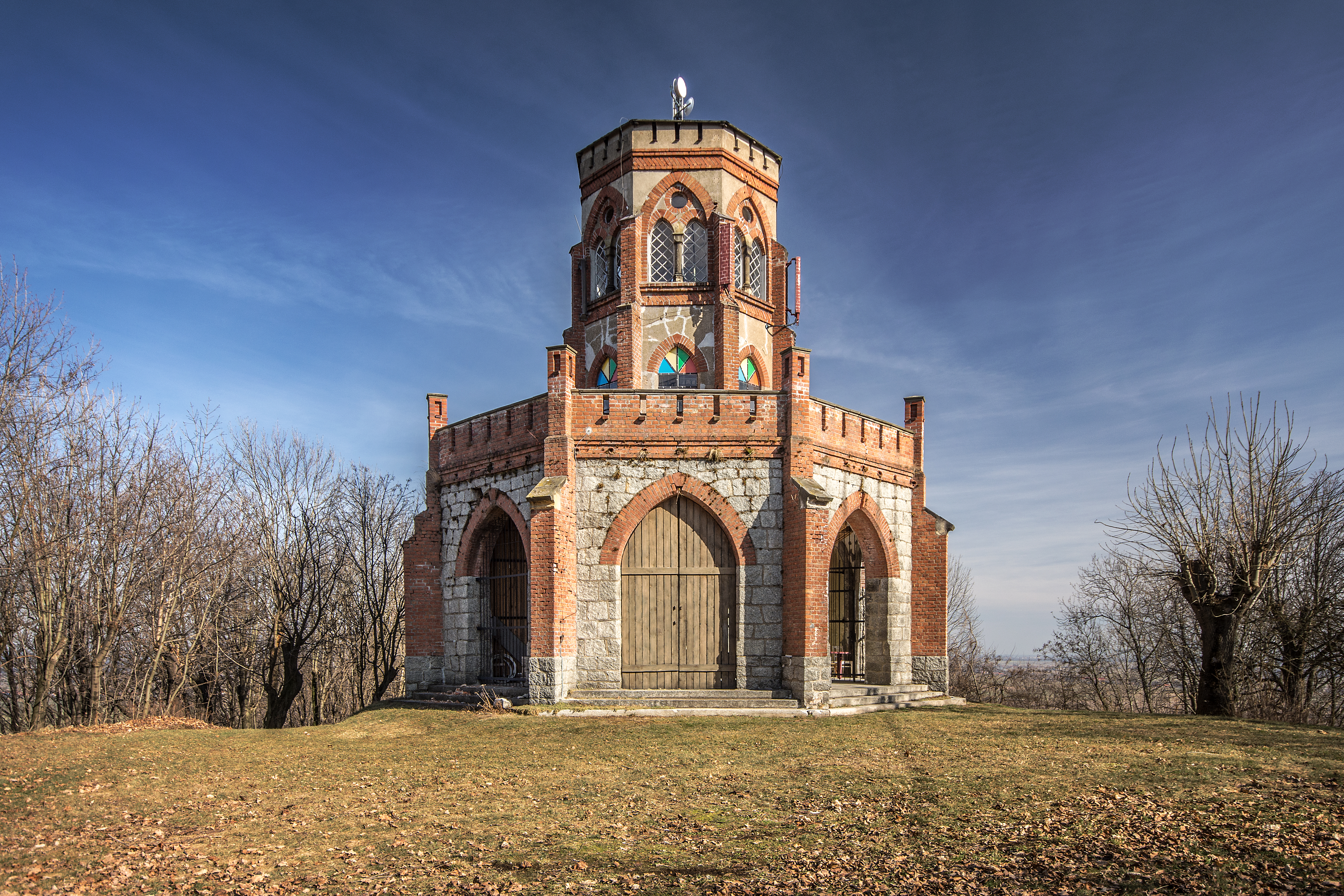 Dobromierz, wieża widokowa, 2 poł. XIX